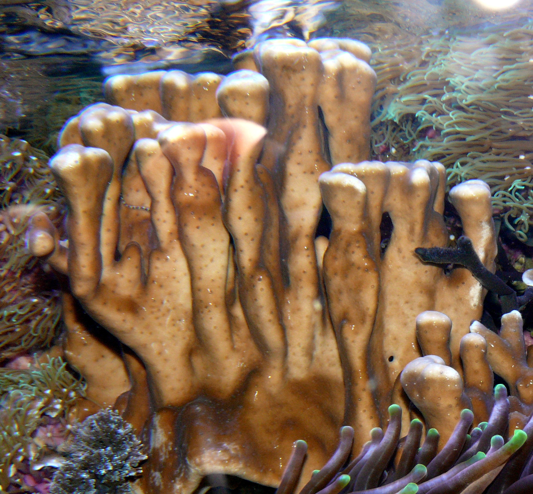 Blaue Koralle (Heliopora coerulea)